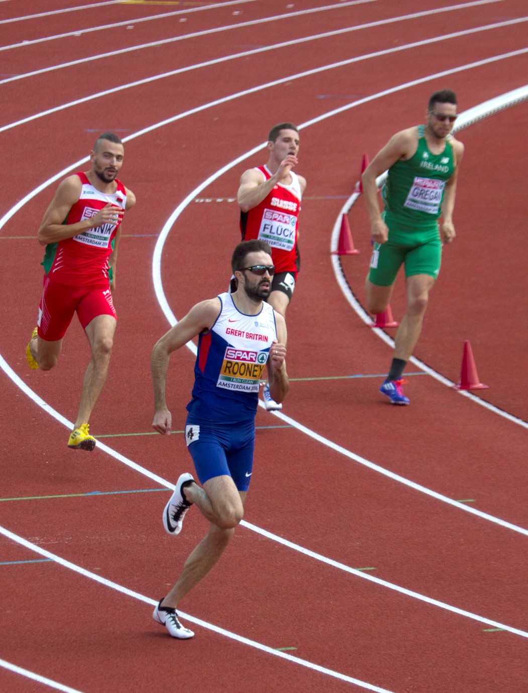 0154 reeksen 400m rooney